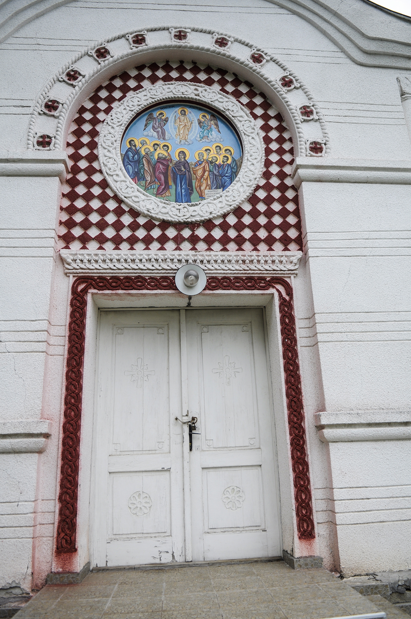 Влезот во црквата Свети Спас во Бунарџик.